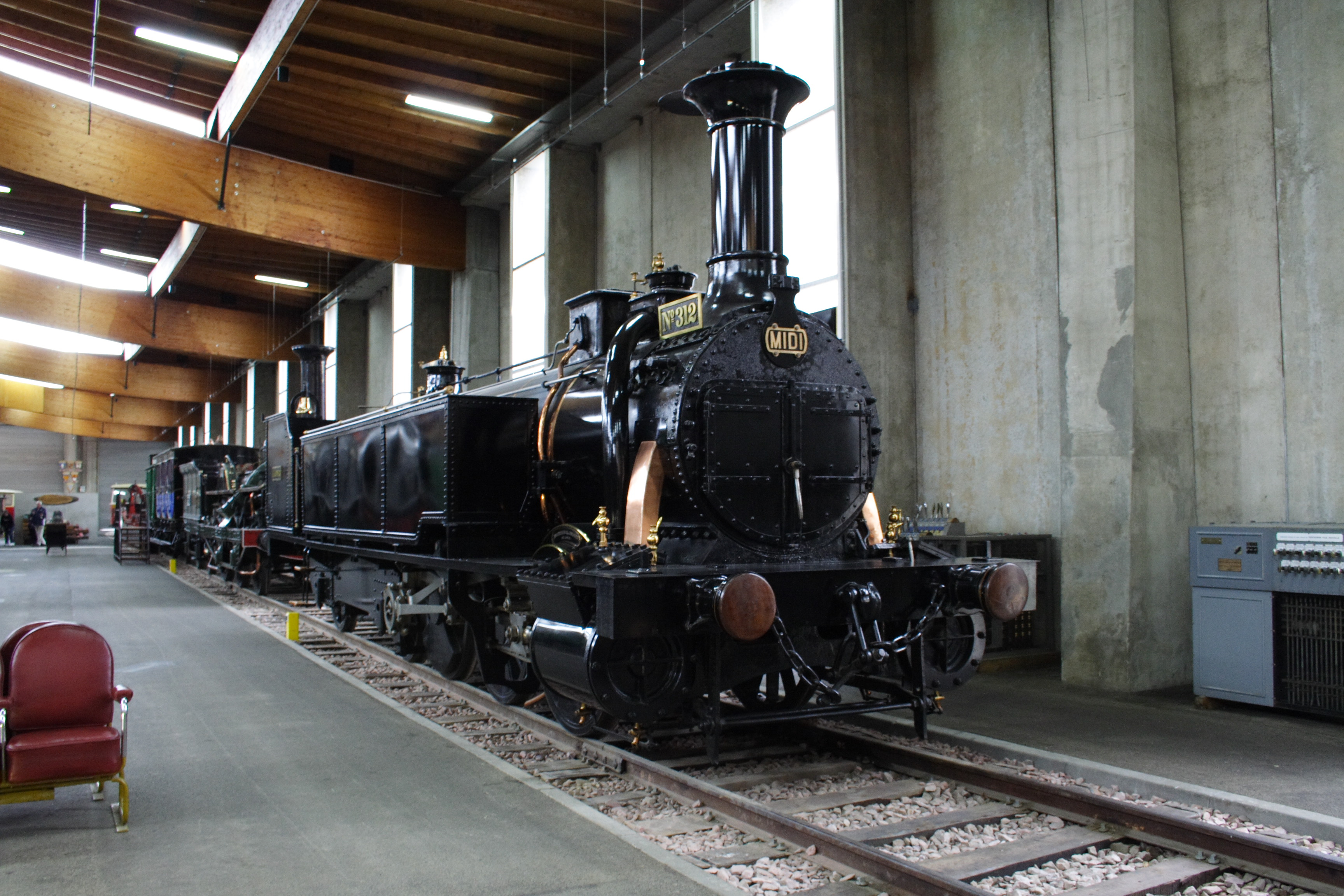 a steam locomotive "Adour" at the Cité du Train de Mulhouse(Mulhouse, France)